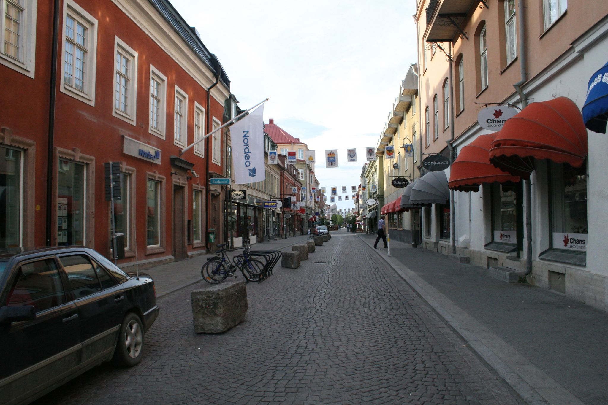 Storgatan, Östersund, Sweden.